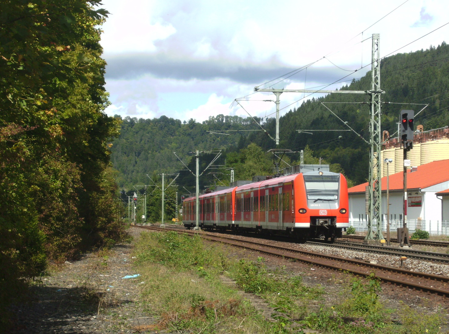 Ein aus der Baureihe 425 und 426 gebildeter Regional-Express Stuttgart-Singen erreicht den Bahnhof Oberndorf am Neckar